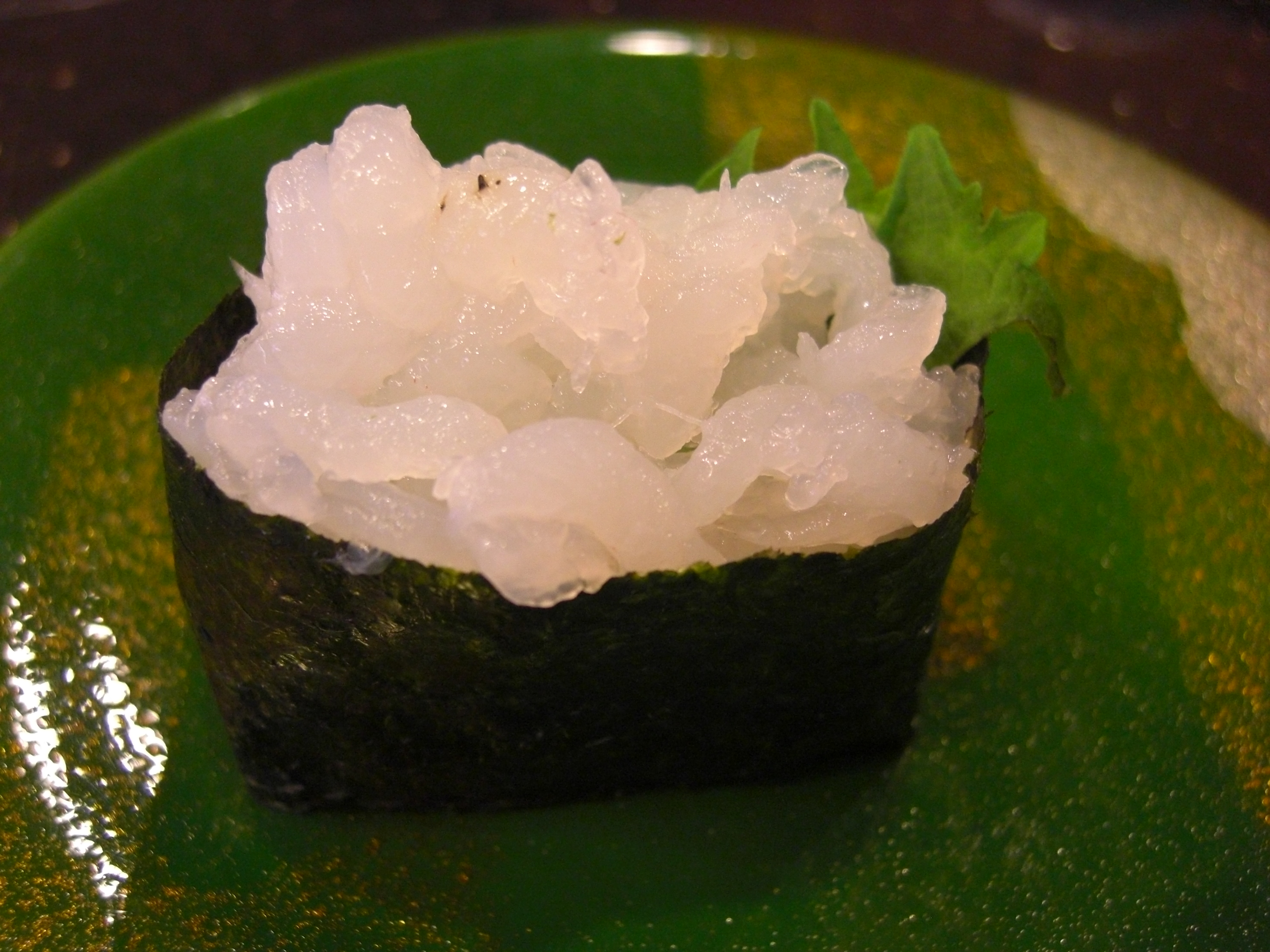 白エビの軍艦のお寿司 北陸ではシロエビと呼ばれているが正式名はシラエビ